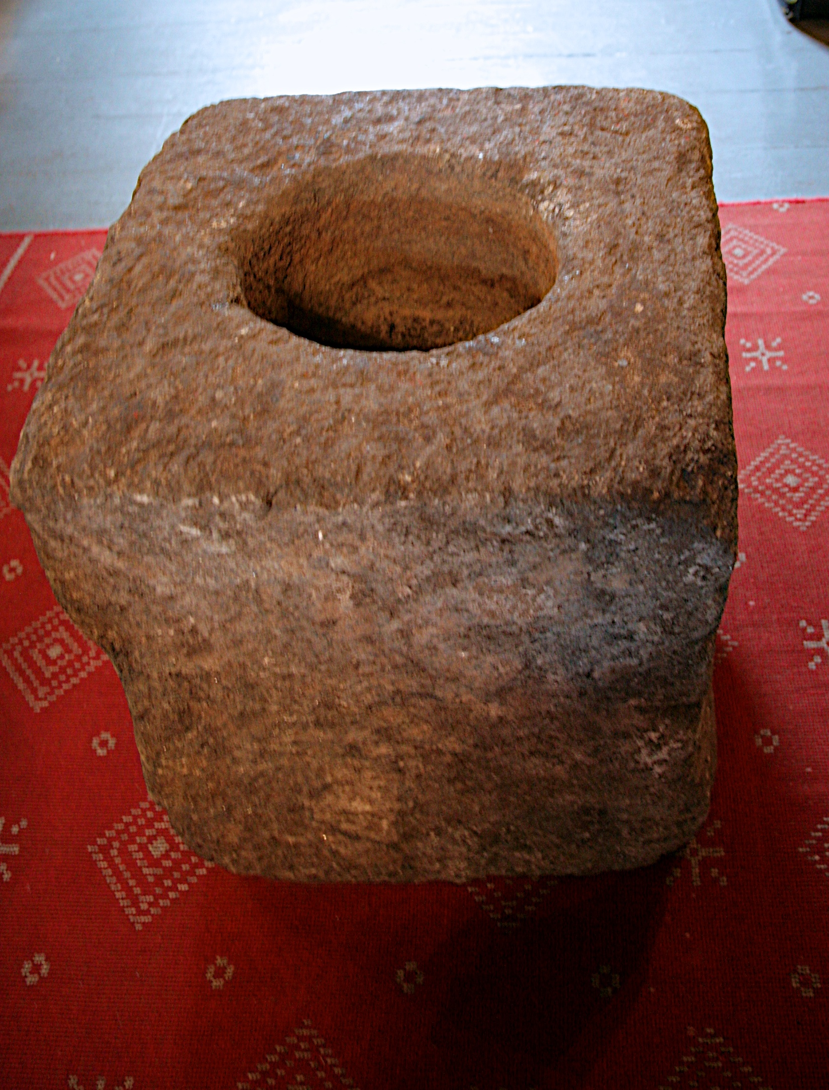 Døpefonten i Gulen kirke